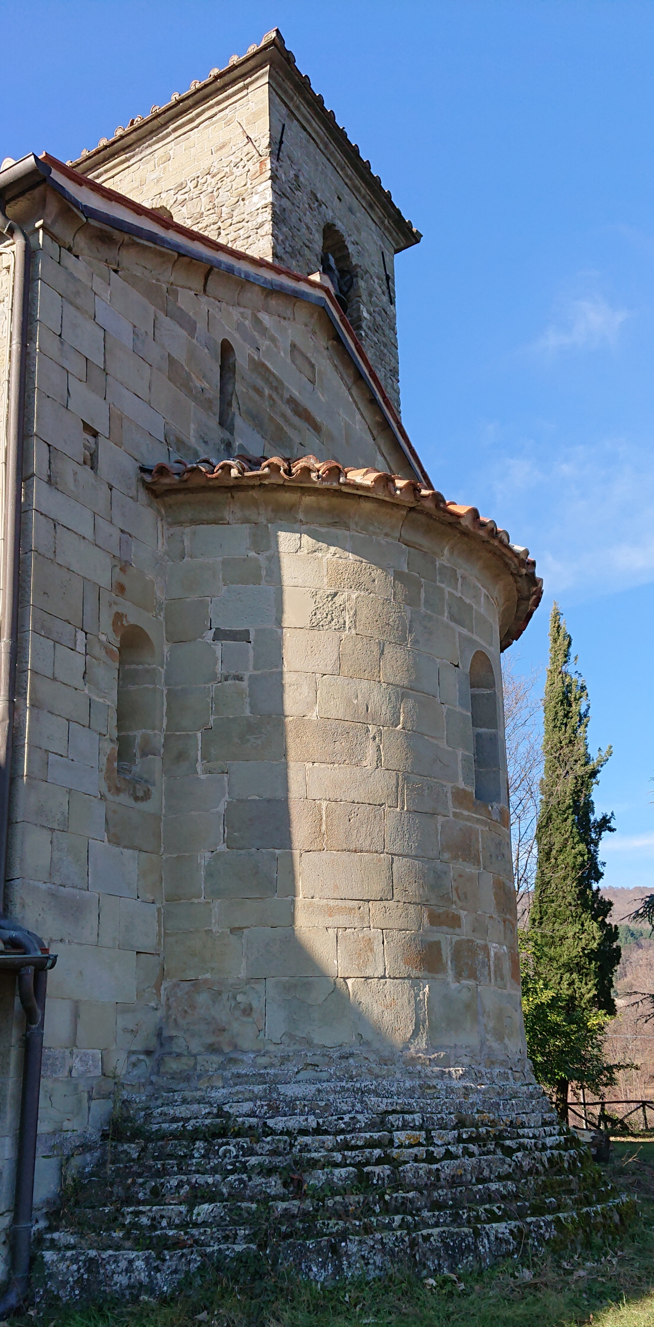 Struttura semicircolare esterna che risale all'edificio originario della metà del secolo XIII.